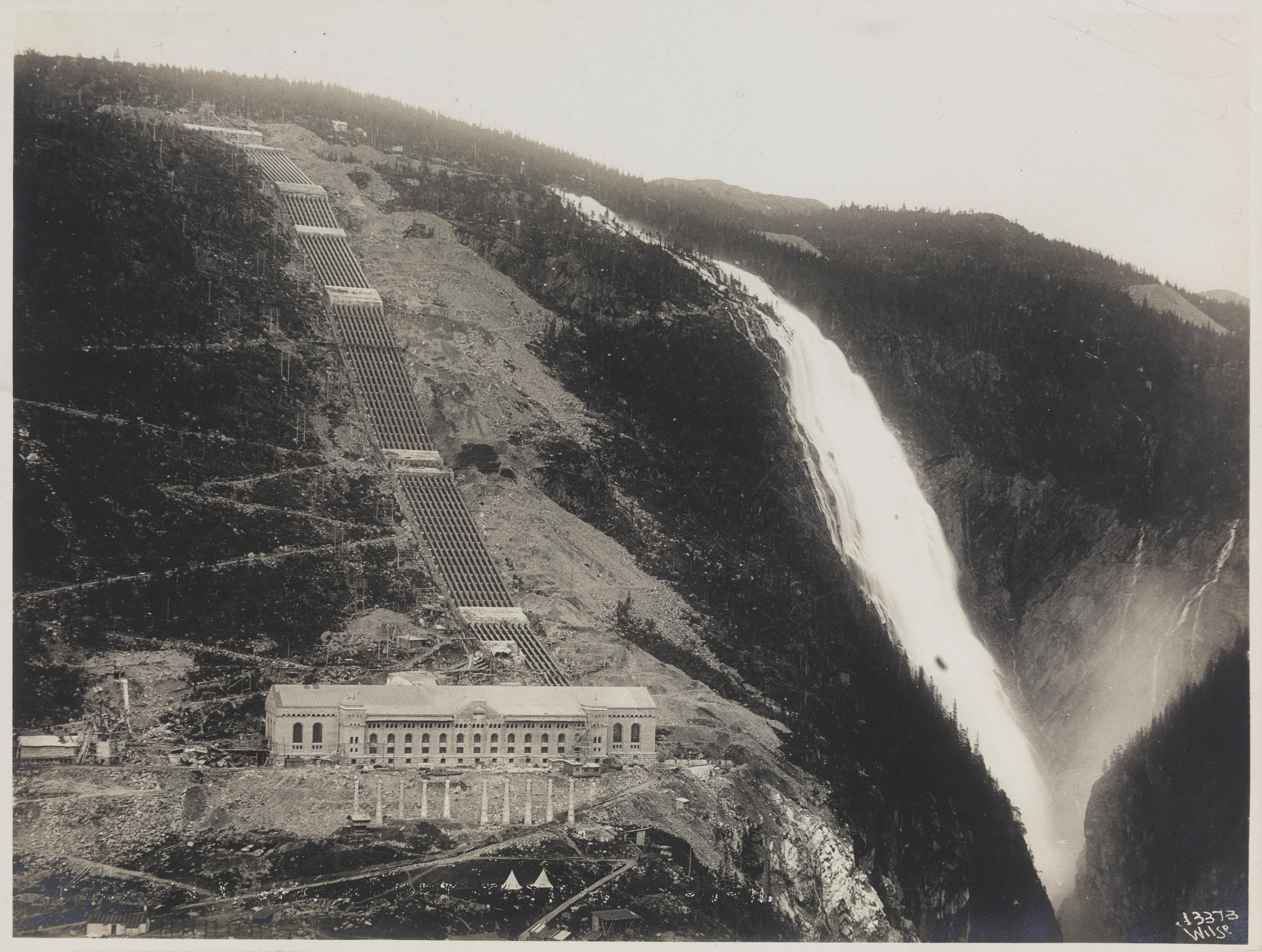 Bildet er hentet fra Nasjonalbibliotekets bildesamling Rjukan, Vemork, Tinn, Telemark